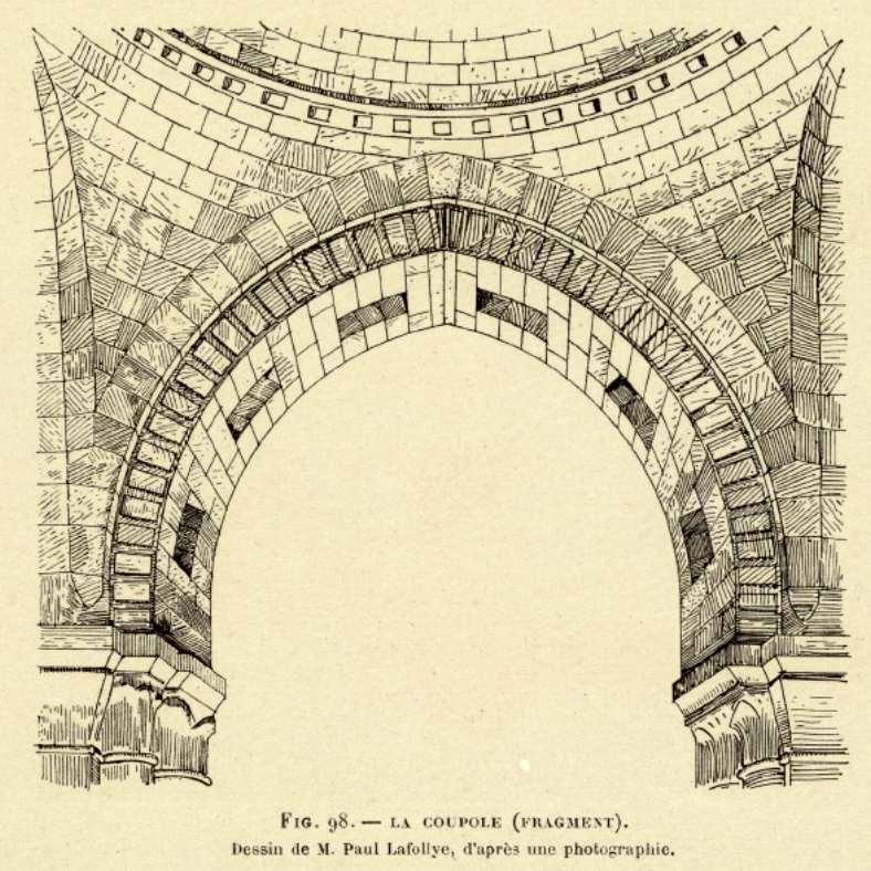 Peujard église Notre-Dame croquis